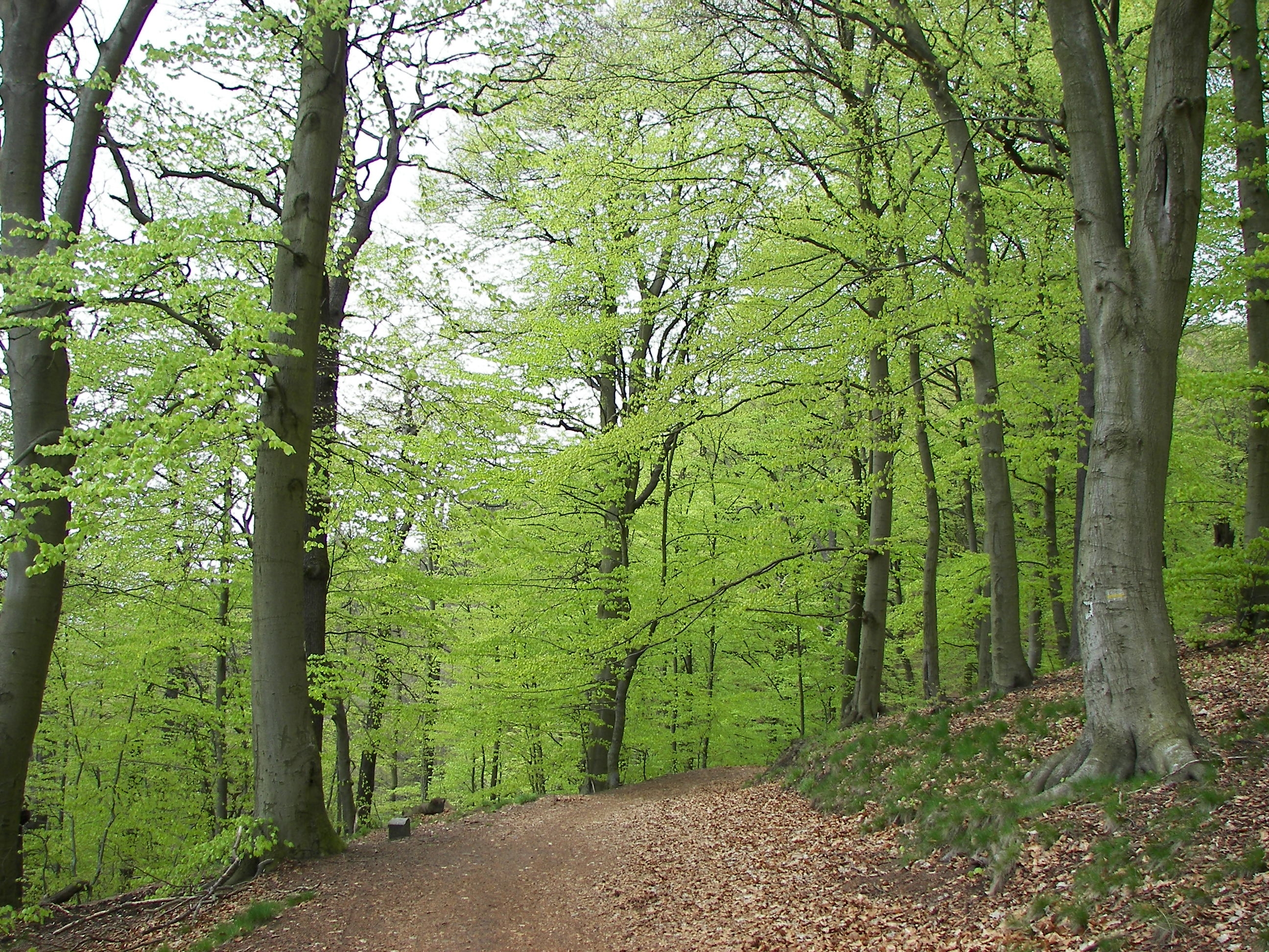 Buchenwald auf den Lahnbergen (Buntsandstein) bei Marburg, Hessen, am 01.05.2006